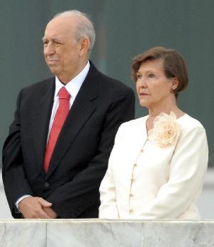 Brasília - [...] o vice-presidente, José Alencar, e sua esposa, Mariza Gomes, [...] a população assiste à cerimônia de posse em frente ao Palácio do Planalto.